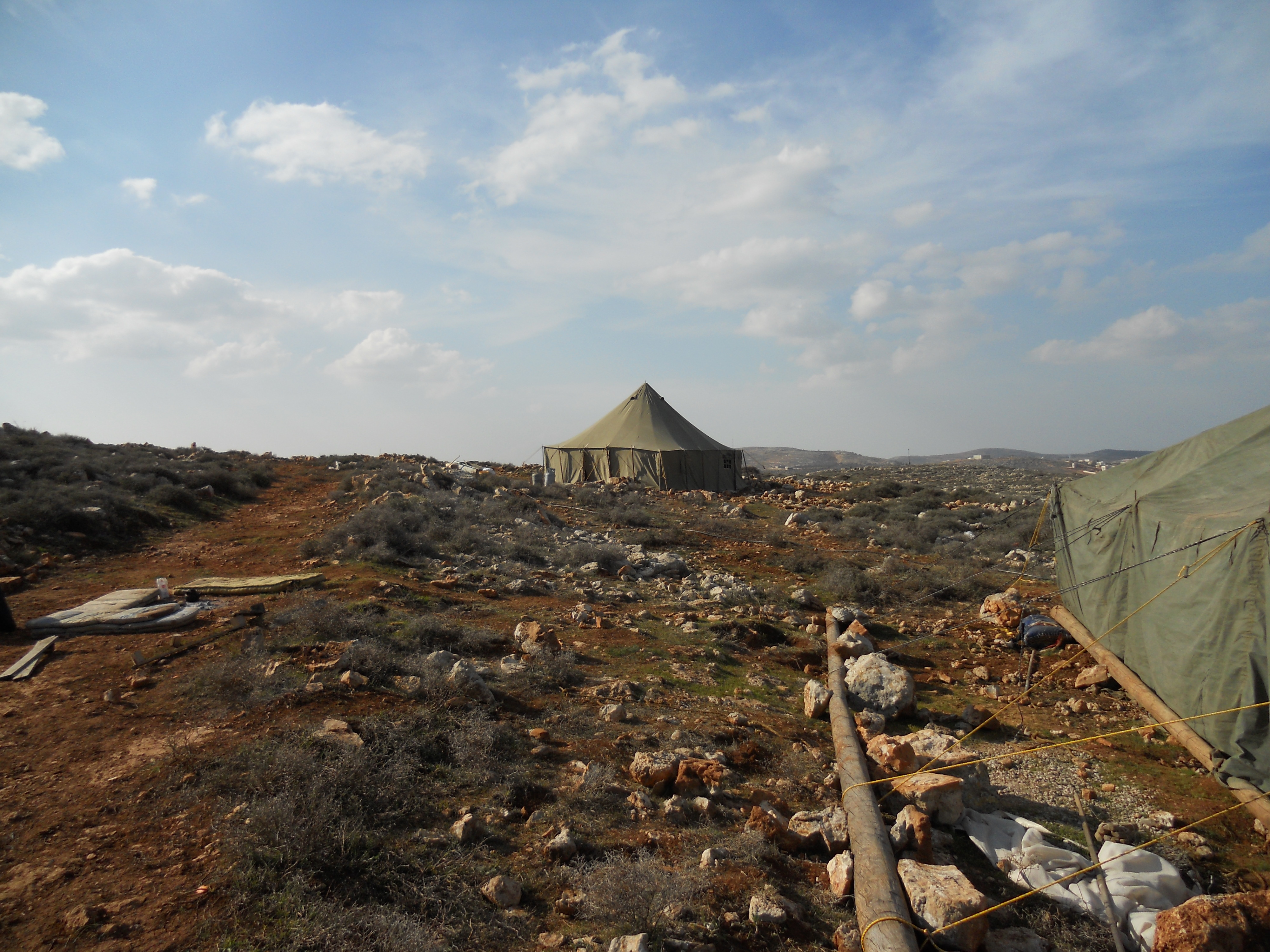 אהלים בגבעת עלי עין בגוש שילה